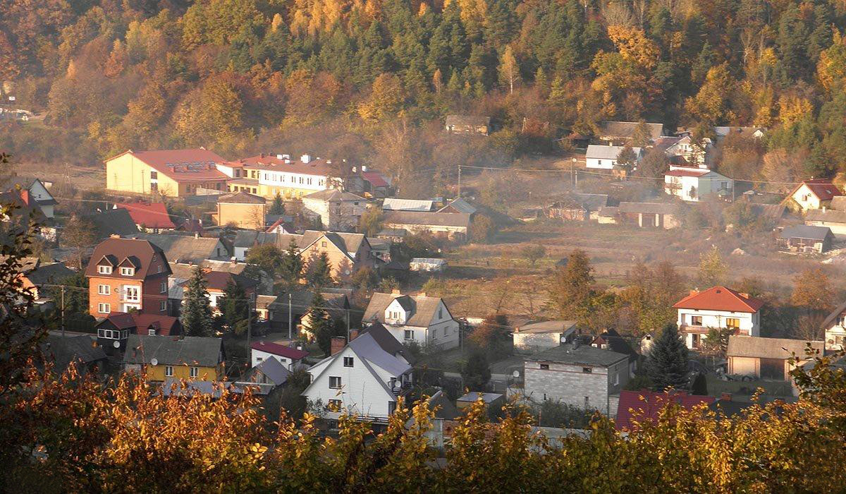 Bochotnica - widok ze wzgórza zamkowego.